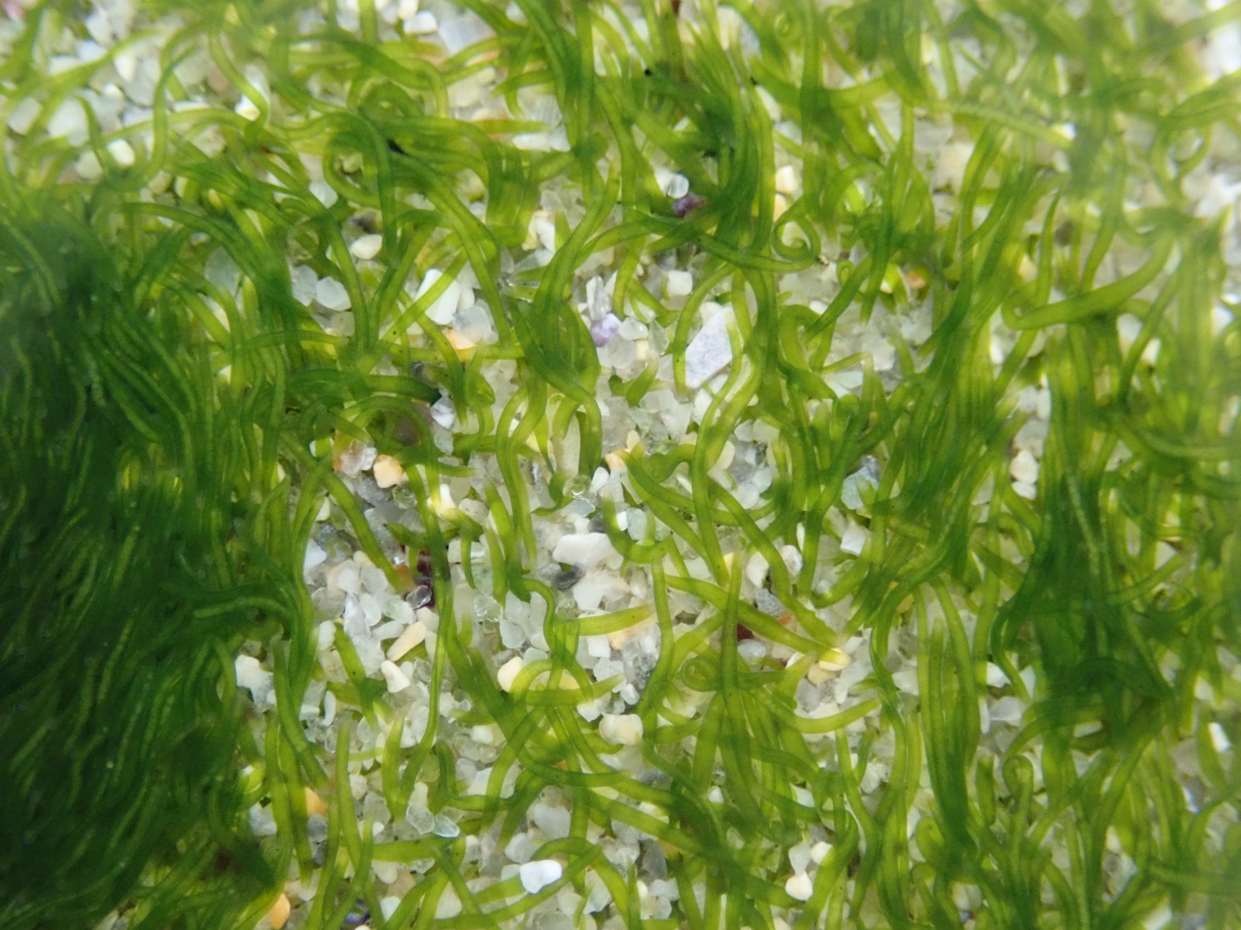 Vue macro